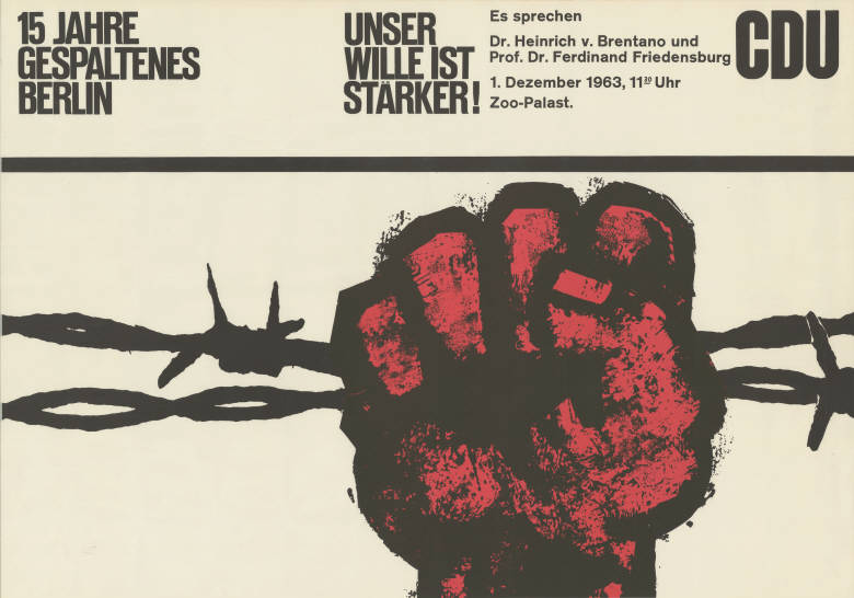 15 Jahre gespaltenes Berlin Unser Wille ist stärker Es sprechen Dr. Heinrich von Brentano und Prof. Dr. Ferdinand Friedensburg ... CDUAbbildung:Blutrote Hand (Faust) umfasst Stacheldraht (Grafik)Plakatart:AnkündigungsplakatObjekt-Signatur:10-031 : 357Bestand:CDU-Plakate (10-031)GliederungBestand10-18:CDU-Plakate (10-031) » Ankündigungsplakate » 1960 - 1969Lizenz:KAS/ACDP 10-031 : 357 CC-BY-SA 3.0 DE